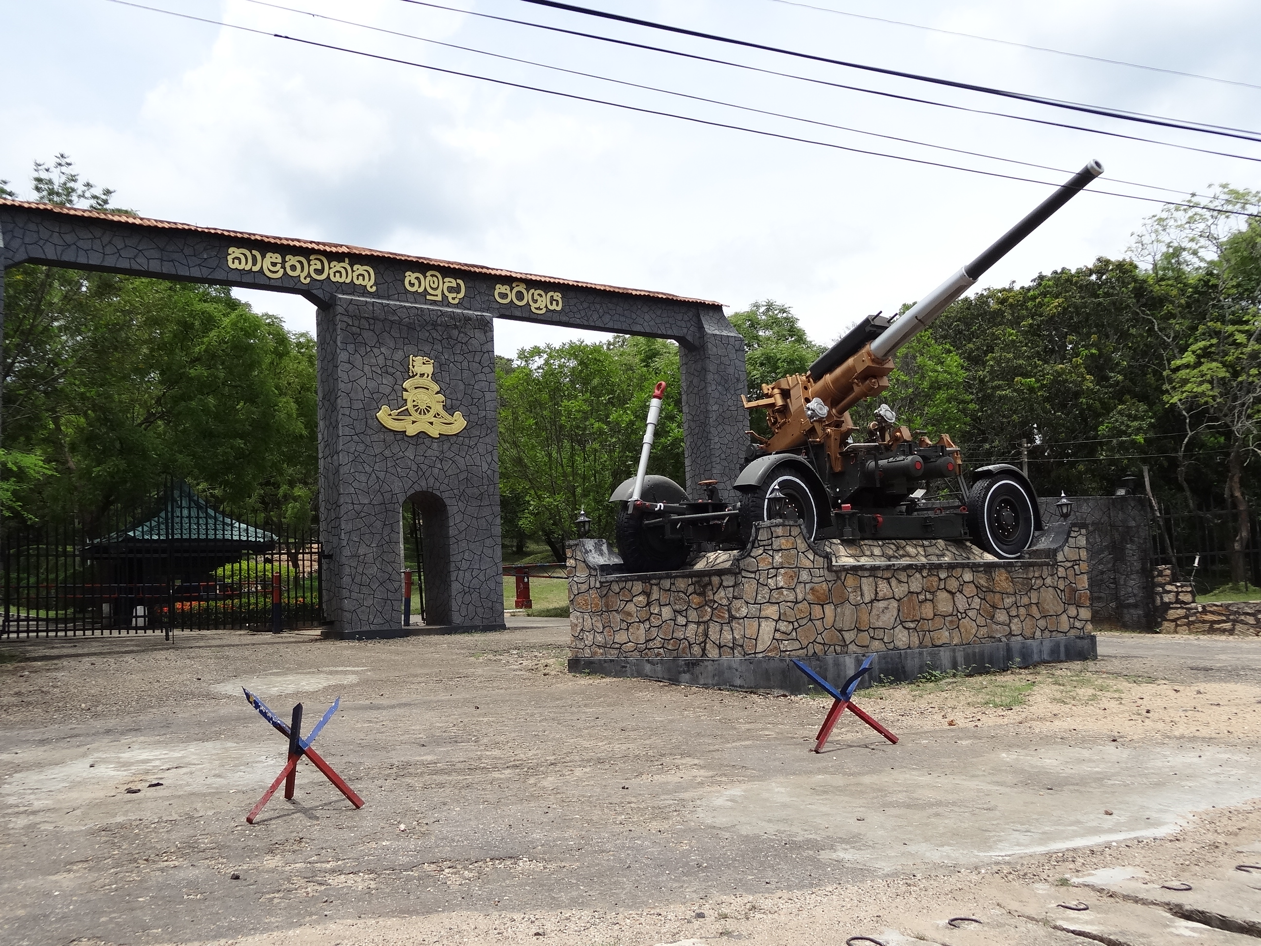 Artillery Complex, Minneriya, Sri Lanka